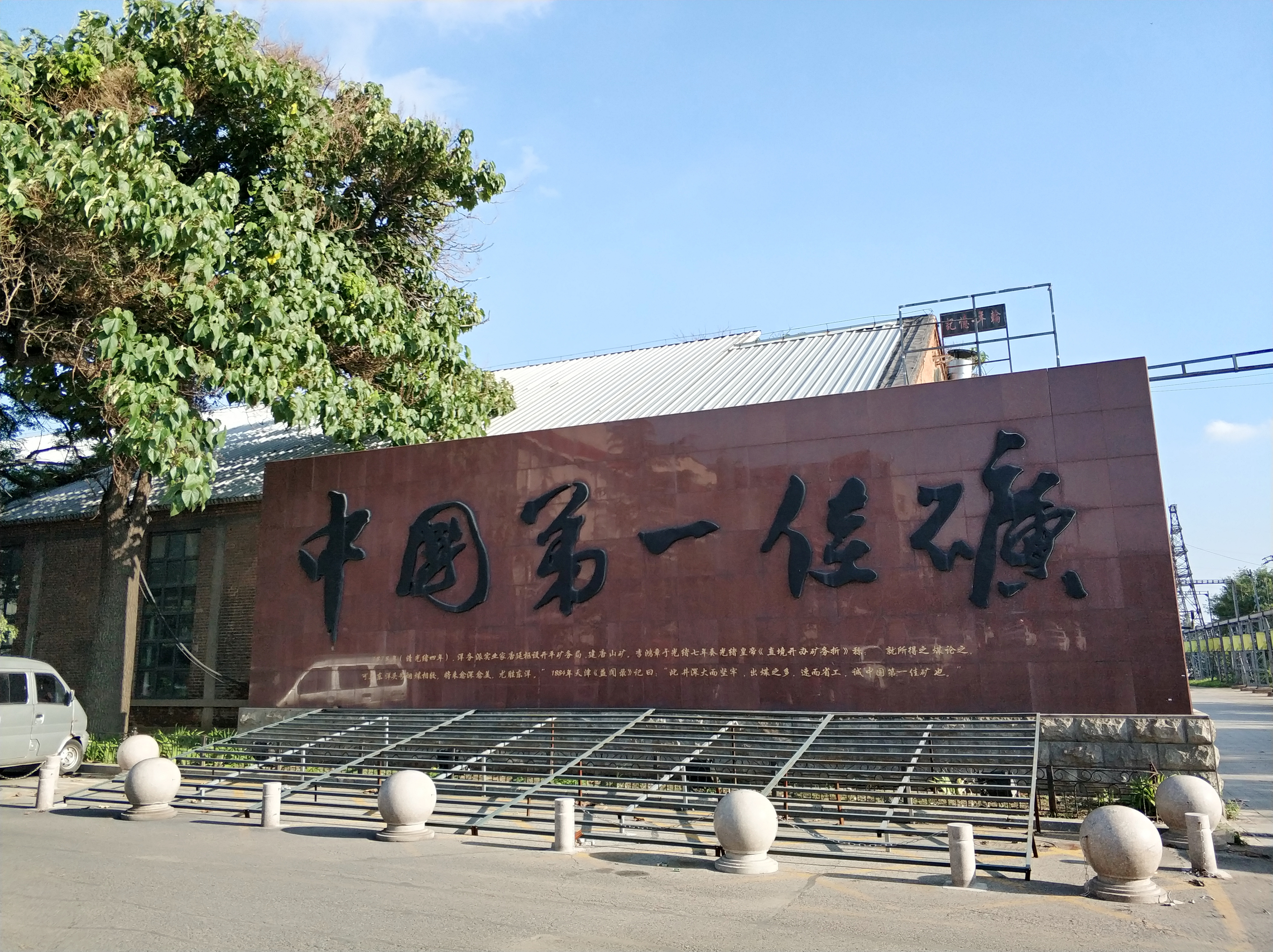 中文（中国大陆）: 开滦唐山矿